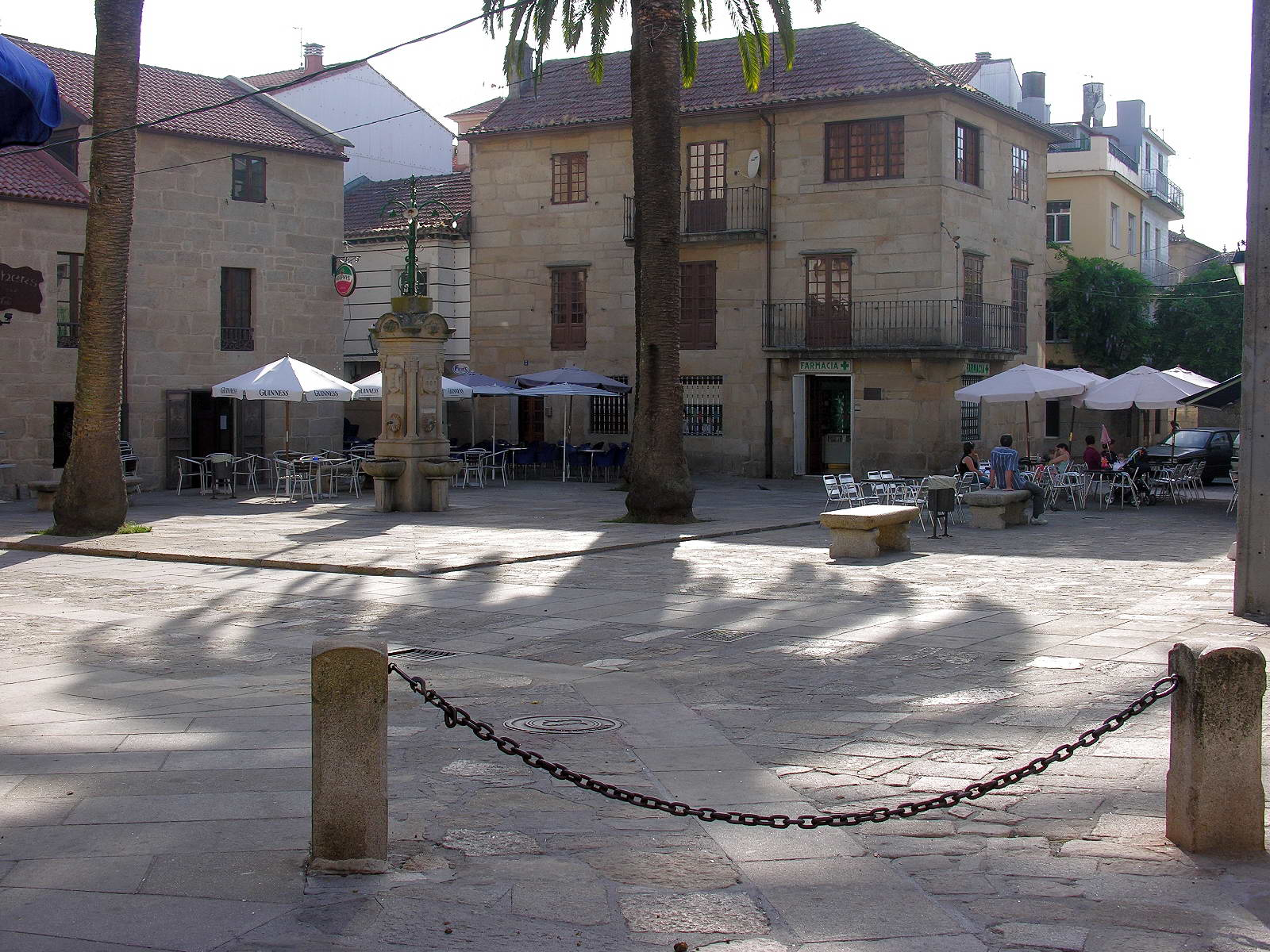 Cambados, Galicia, España Publish by= Luis Miguel Bugallo Sánchez. Self made.